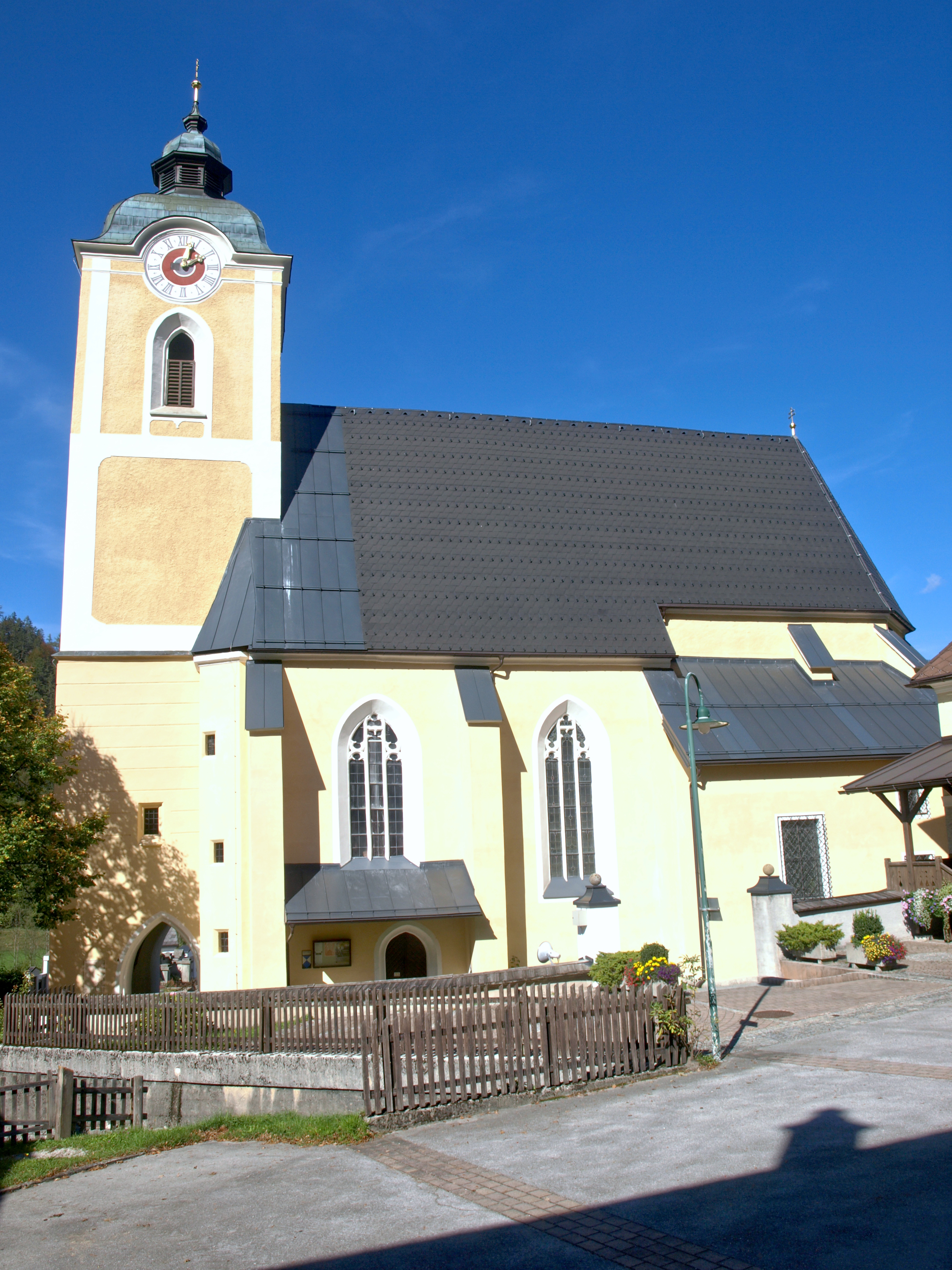 Kath. Pfarrkirche hl. Bartholomäus und Friedhof